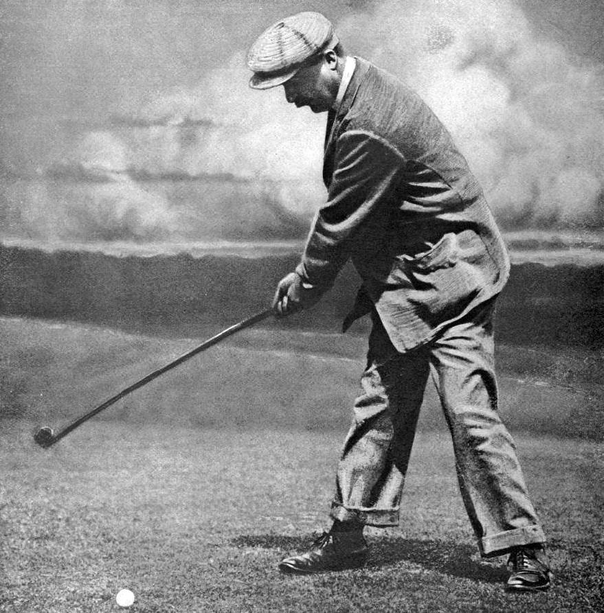 Arnaud Massy, vainqueur du tournoi de golf aux Jeux Interlliés de 1919 (devant son compatriote Dauge, le 12 juillet à La Boulie).